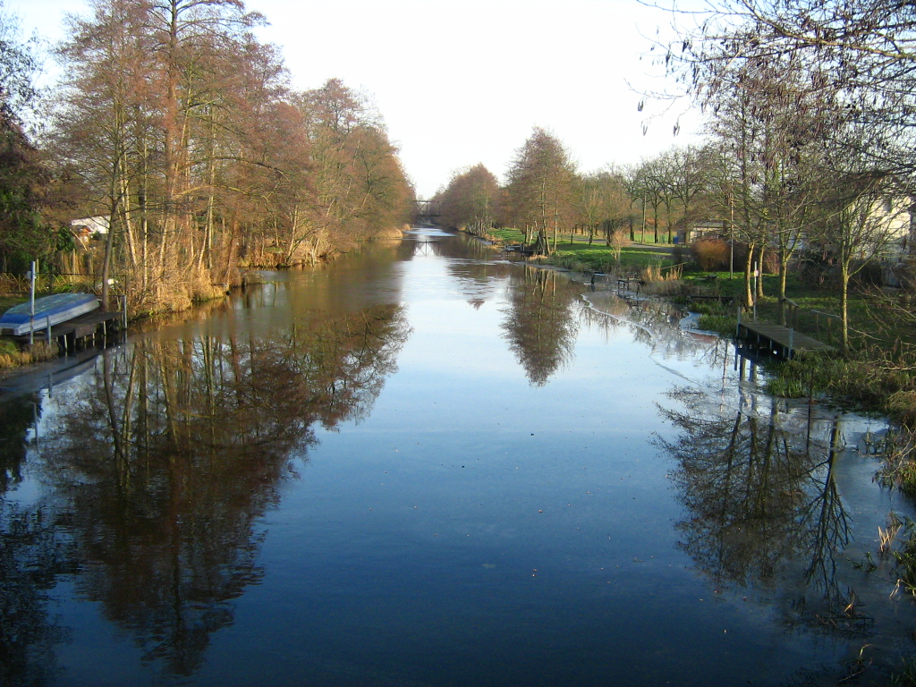 Der Trödelgraben, das ehemalige westliche Anfangsstück des Finowkanals bei Liebenwalde, Anfang des 20. JH, in Zerpenschleuse. an der Bundesstraße B 109 zugeschüttet, und daher jetzt nur noch ein Totarm. Die Widereröffnung für die Sportbootschifffahrt ist geplant.